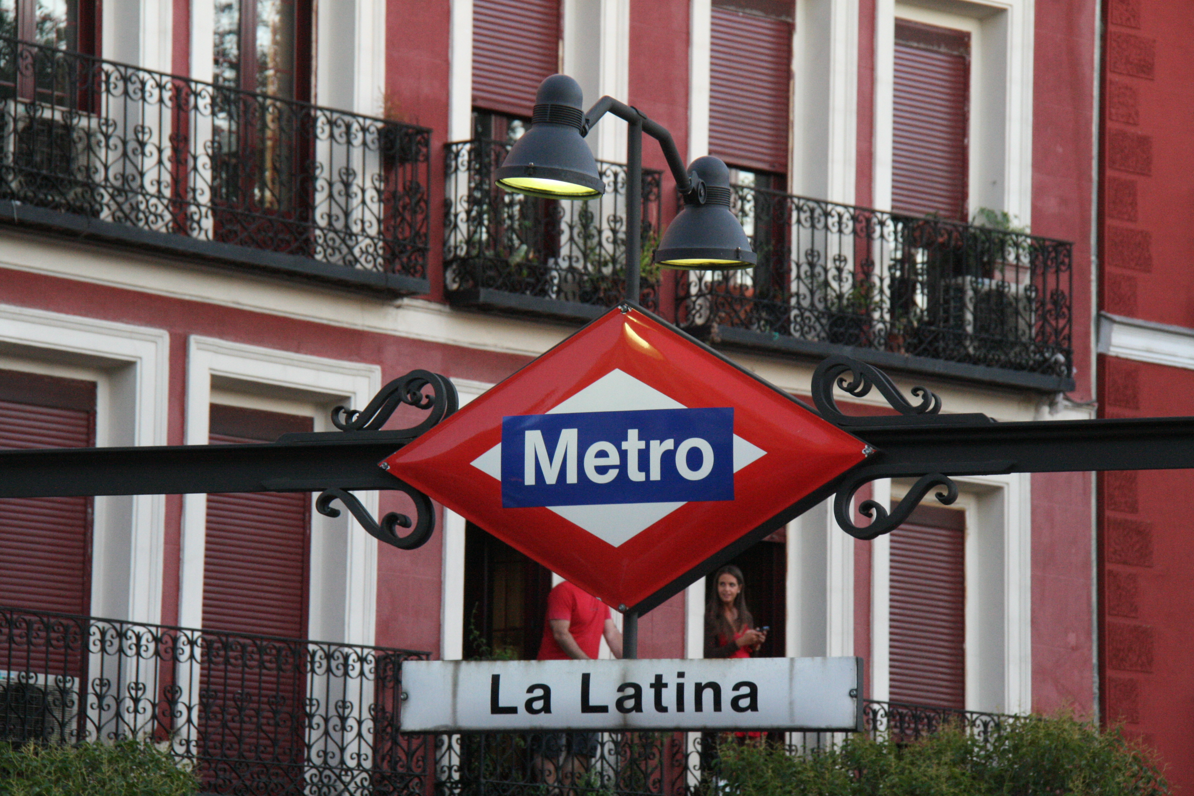 Etación de Metro de la Latina